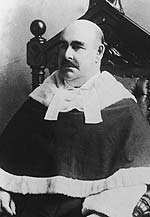 George Edwin King (1839-1901)